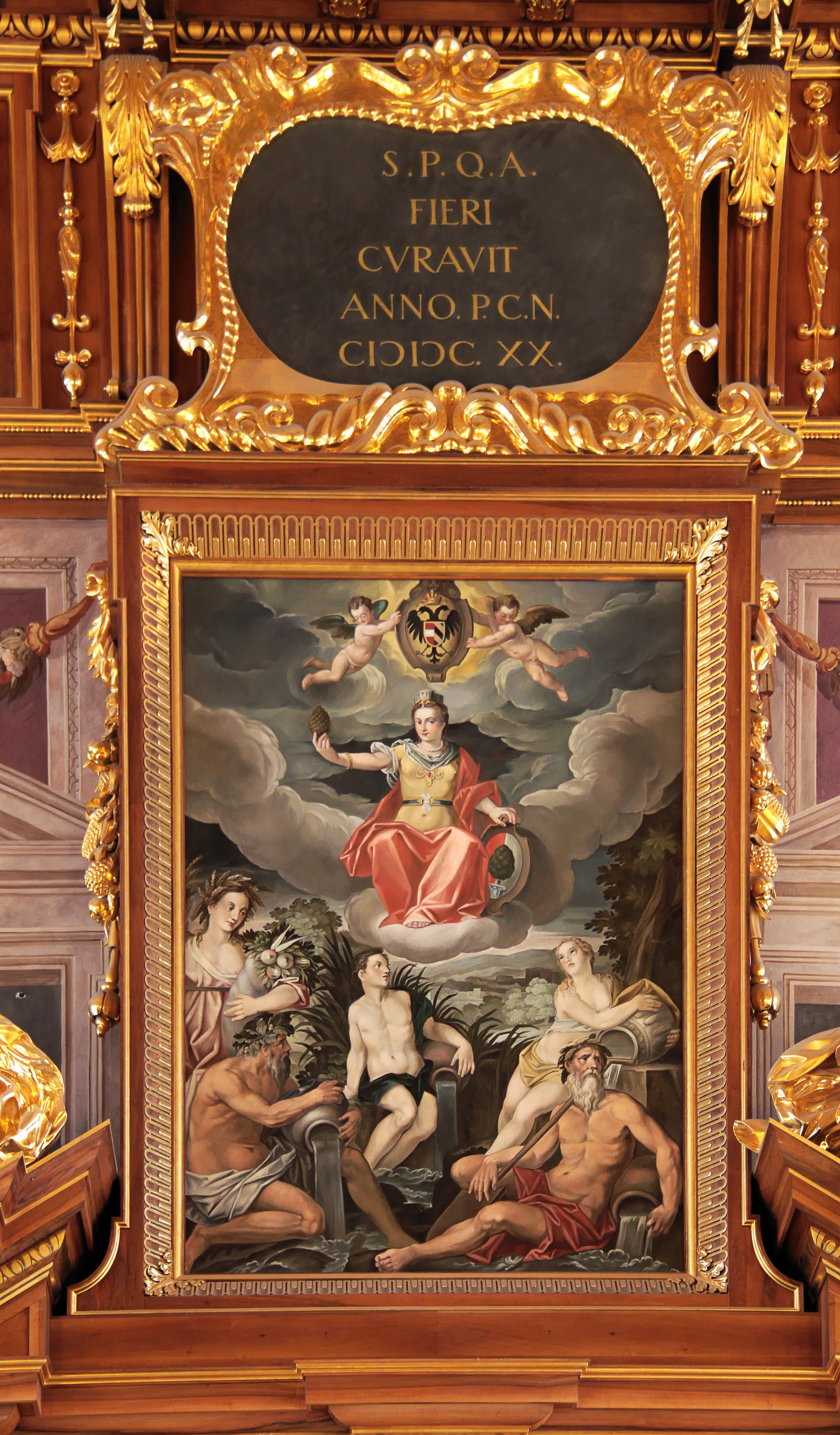 Wandbild im Goldenen Saal (Augsburg). Es ist eine Rekonstruktion des Werkes des Augsburger Künstlers Hans Rottenhammer, das über einem der Portale angebracht ist. Es zeigt eine auf einer Wolke schwebende, sitzende Kaiserin, die in der Linken das Augsburger Stadtwappen und in der Rechten eine Zirbelnuss hält. Über ihr schwebt von zwei Putten getragen das Reichsadler-Wappen. Im Vordergrund eine Frauengestalt mit Ähren und Früchten, sowie Personifikationen der vier Augsburger Flüsse Lech, Wertach, Singold und Brunnenbach, welche einen nie versiegenden Strom von Wasser aus ihren Krügen ausgießen.